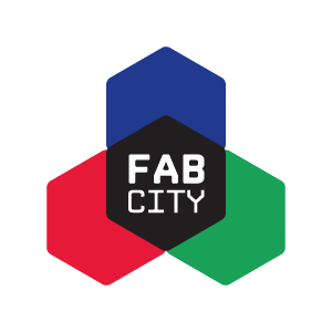 Logo original du projet Fab City